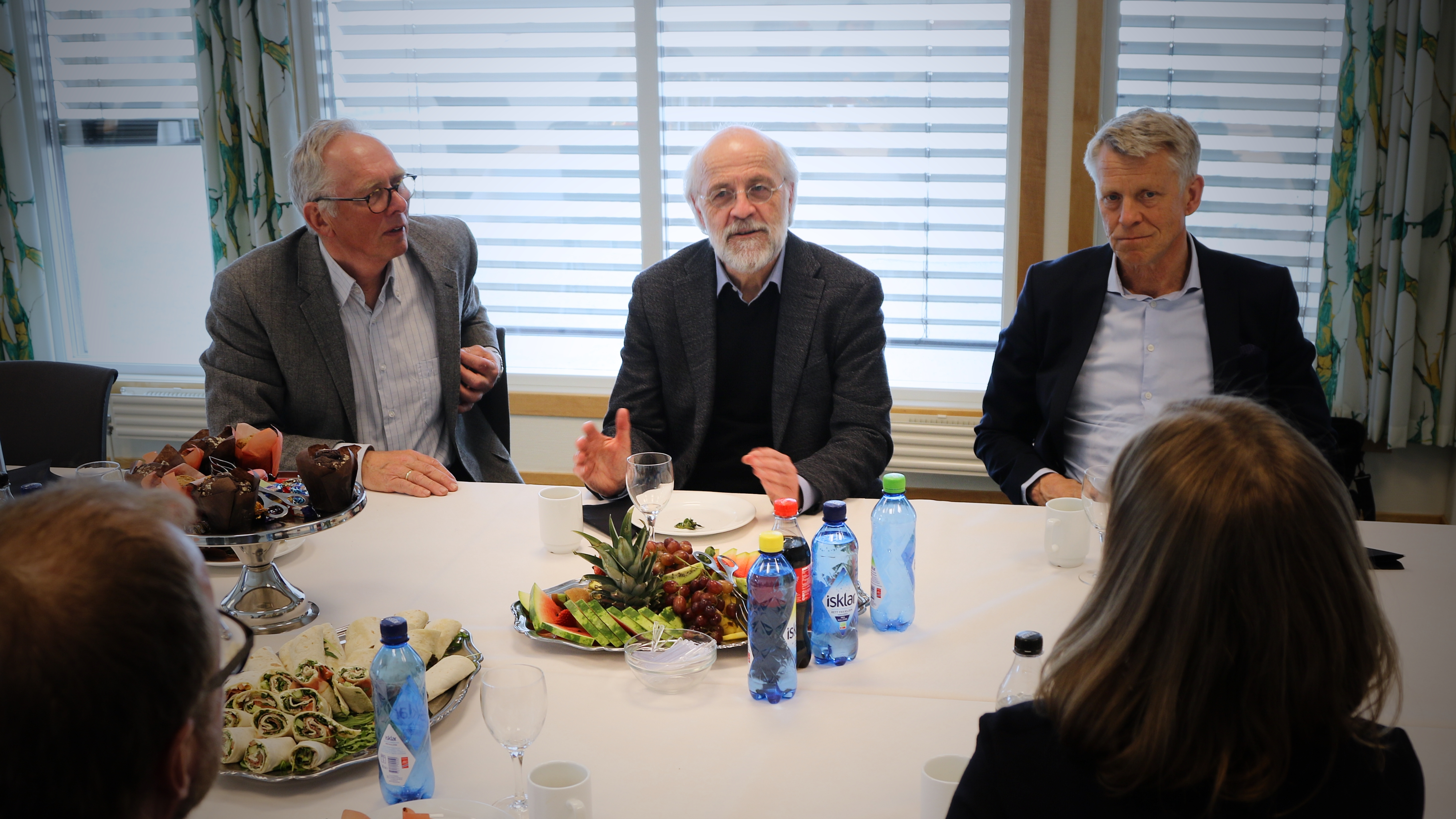 Styreleder ved daværende HSN, Rune Nilsen (f.v.), rektor Petter Aasen og prorektor Nils Kristian Bogen tok imot Forsknings- og utdanningsminister Iselin Nybø på campus Bø torsdag 5. april. Foto: Stian Kristoffer Sande.